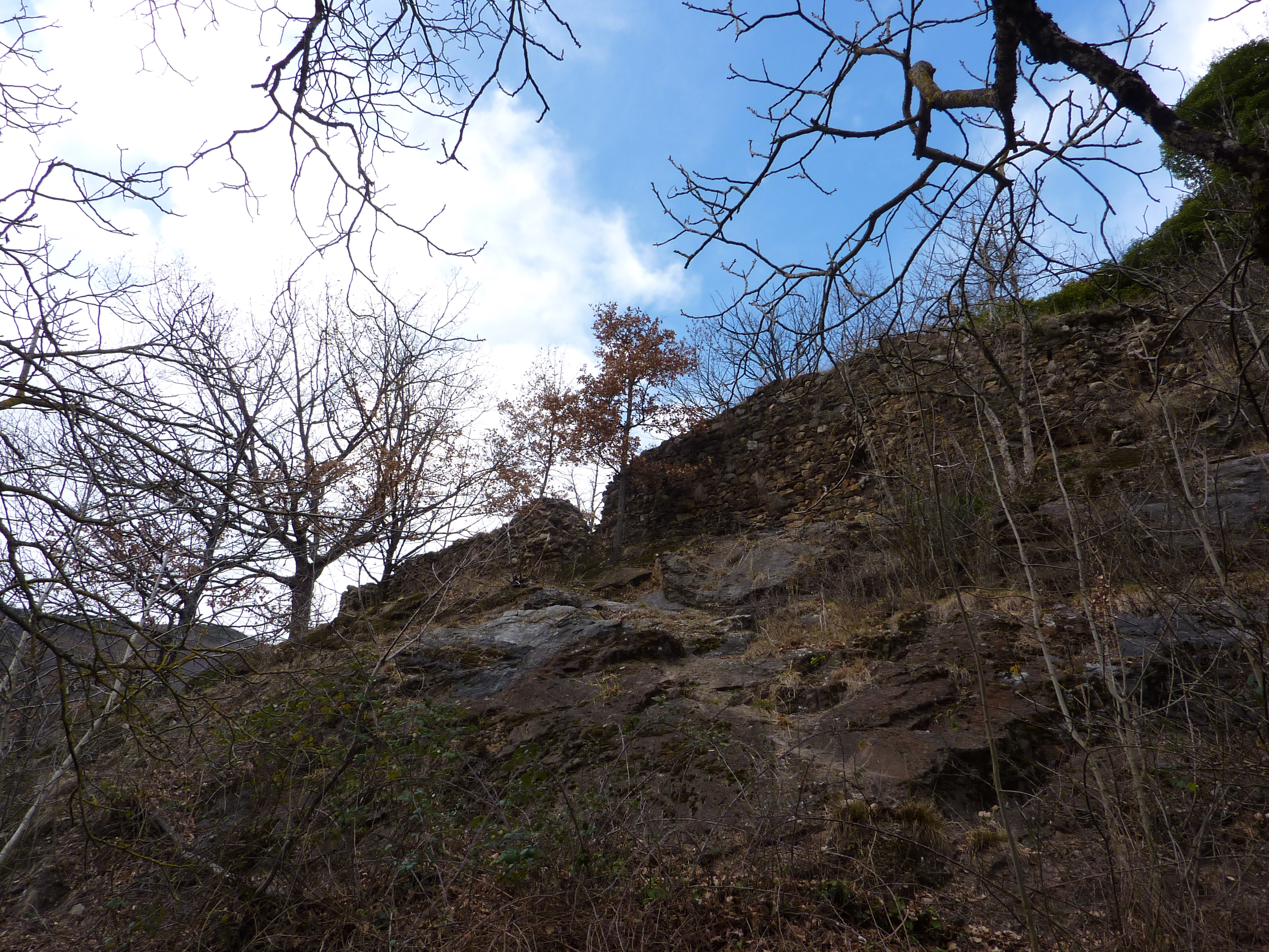 Vue du château féodal de Château-Verdun (Ariège, France).